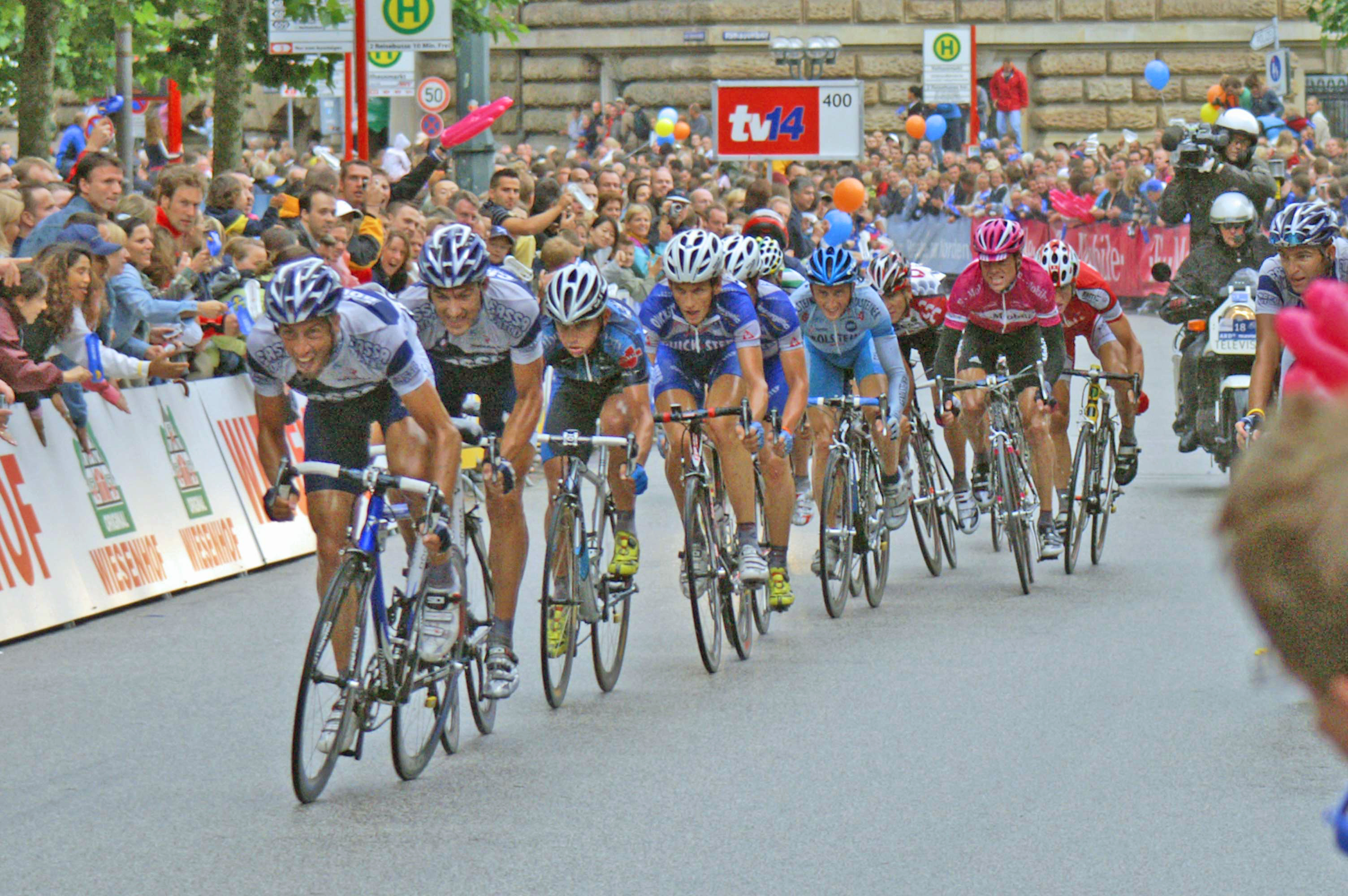 Sprint am HEW Cyclassics 2005